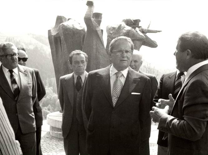 Razgledanje spomenika u Dražgošama